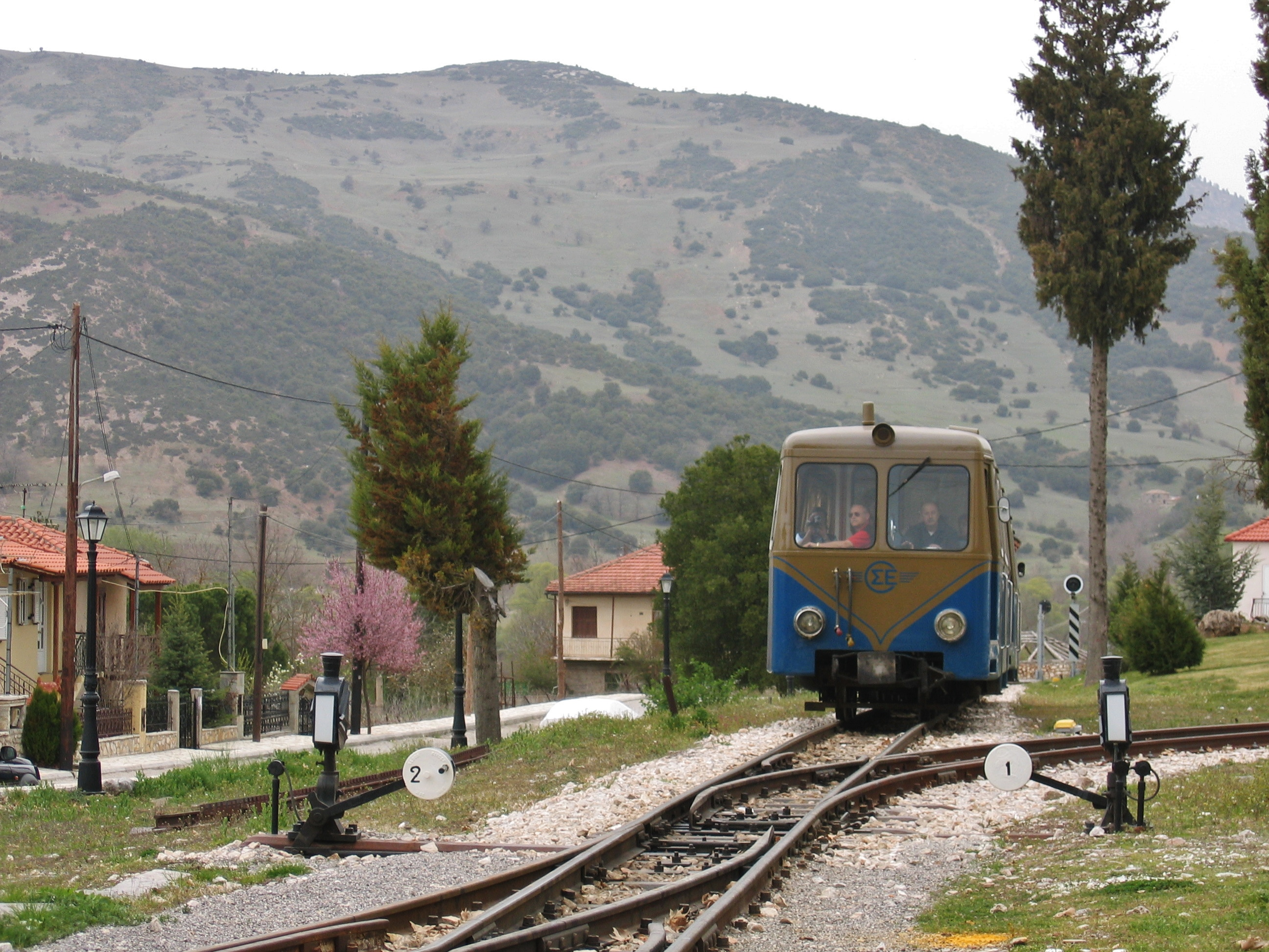 Diakopto–Kalavryta, Οδοντωτός σιδηρόδρομος Διακοπτού – Καλαβρύτων